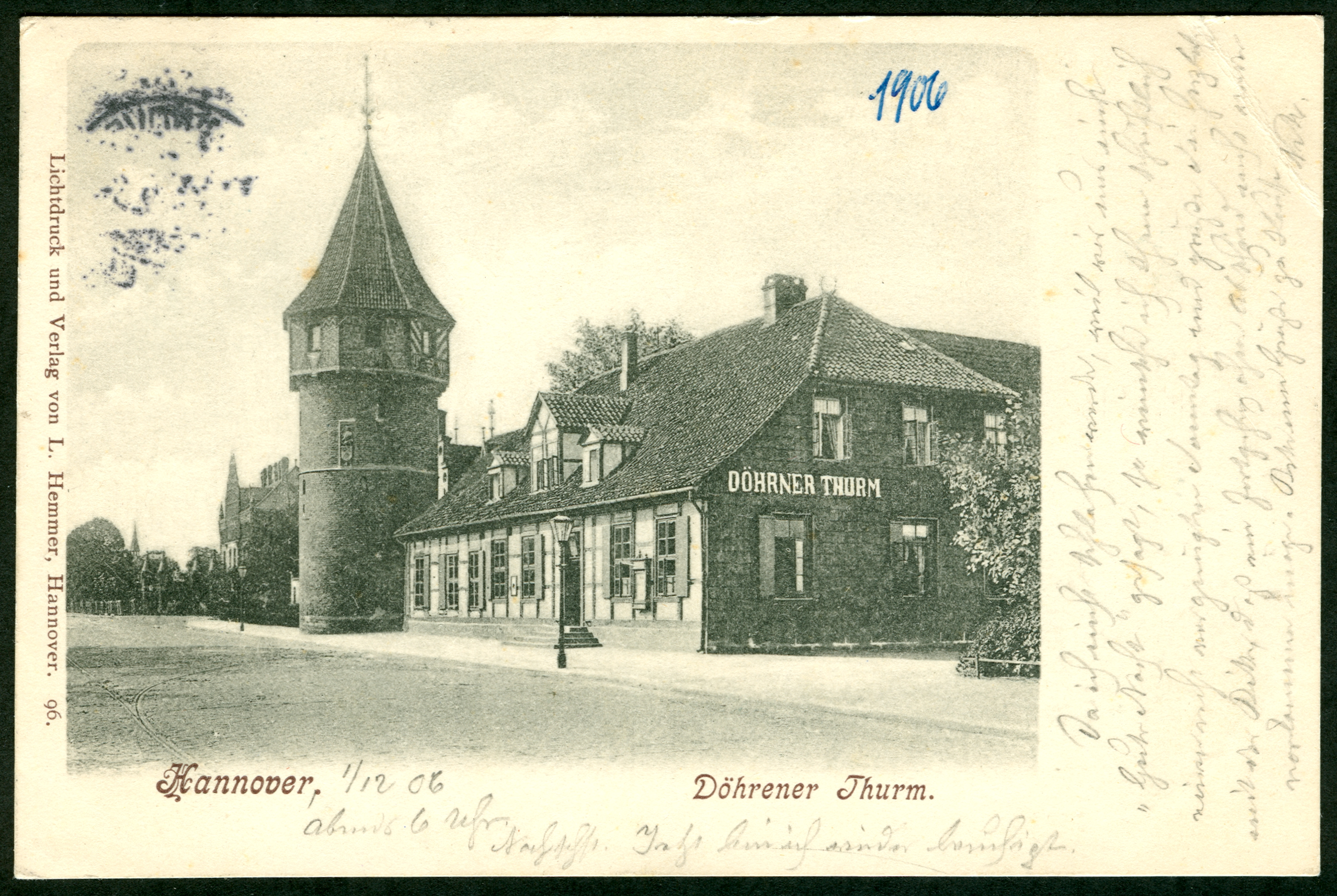 Ansichtskarte Nummer 96 von Ludwig Hemmer. Der Dörener Turm steht hier noch am Straßenrand, im Fachwerkhaus davor die Ausflugs-Gaststätte "Dörner Turm".